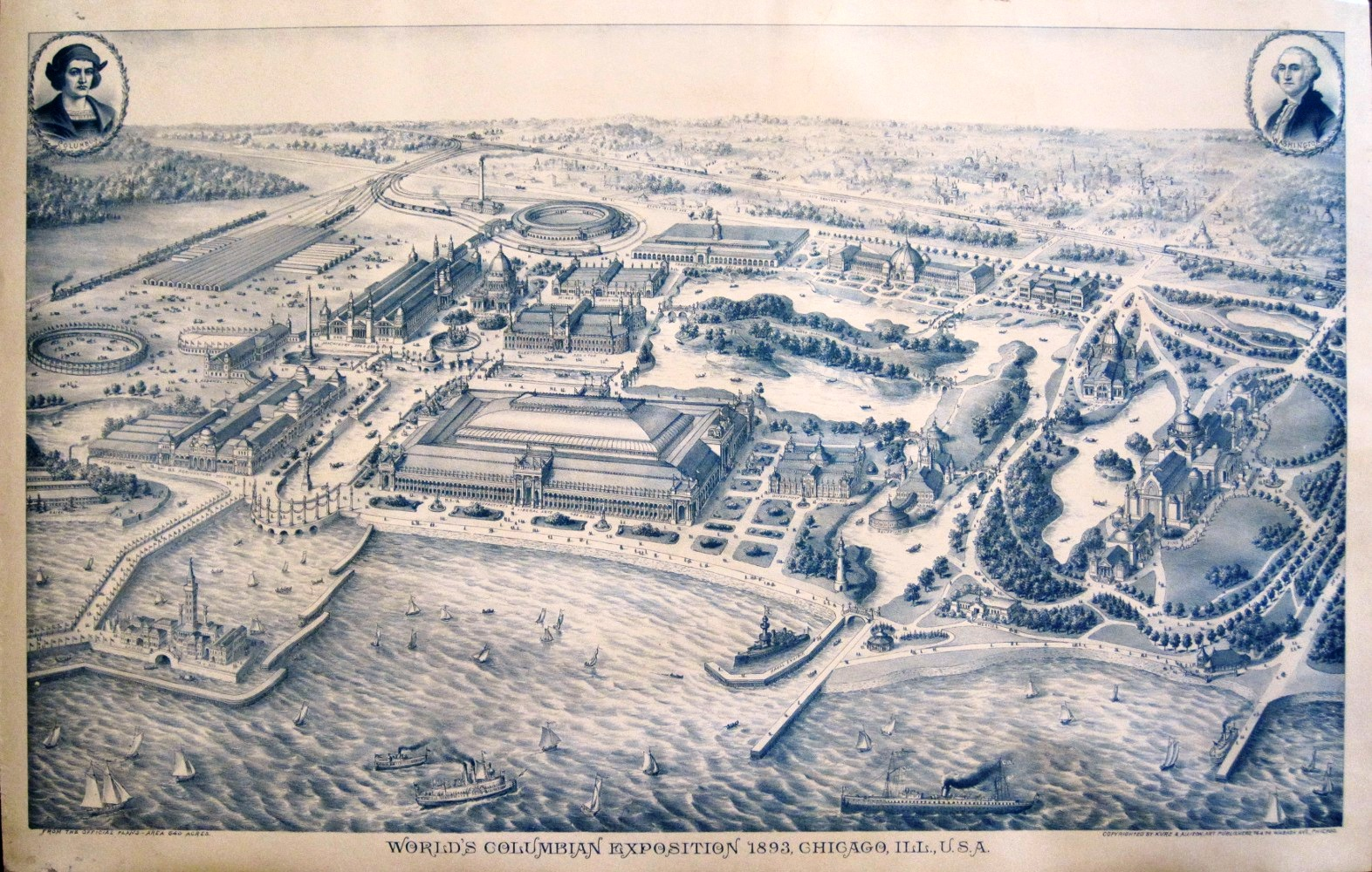 シカゴ万国博覧会の基本プラン。当初、日本館の予定はなかったため、描かれていない。